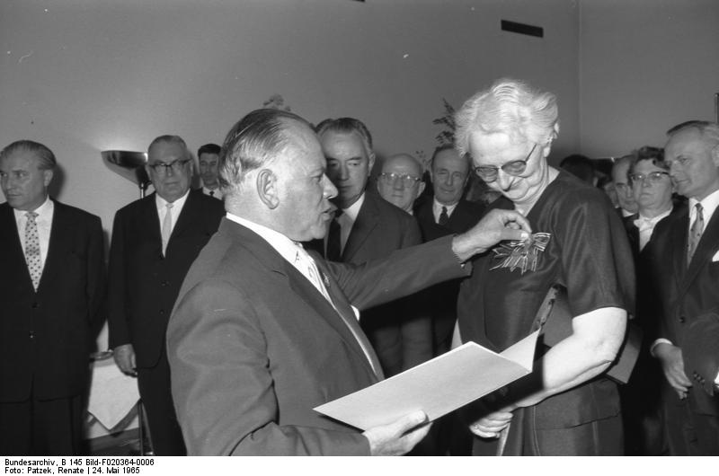 Empfang und Ordensverleihung an Bundestagsabgeordnete durch Bundestagspräsident Dr. Gerstenmaier Bonn (vorne v.l.n.r.: Gerstenmaier, Frau Bleyler)